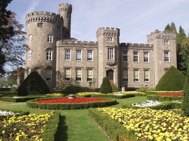 Cyfartha Castle, Merthyr Tydfil, Wales.